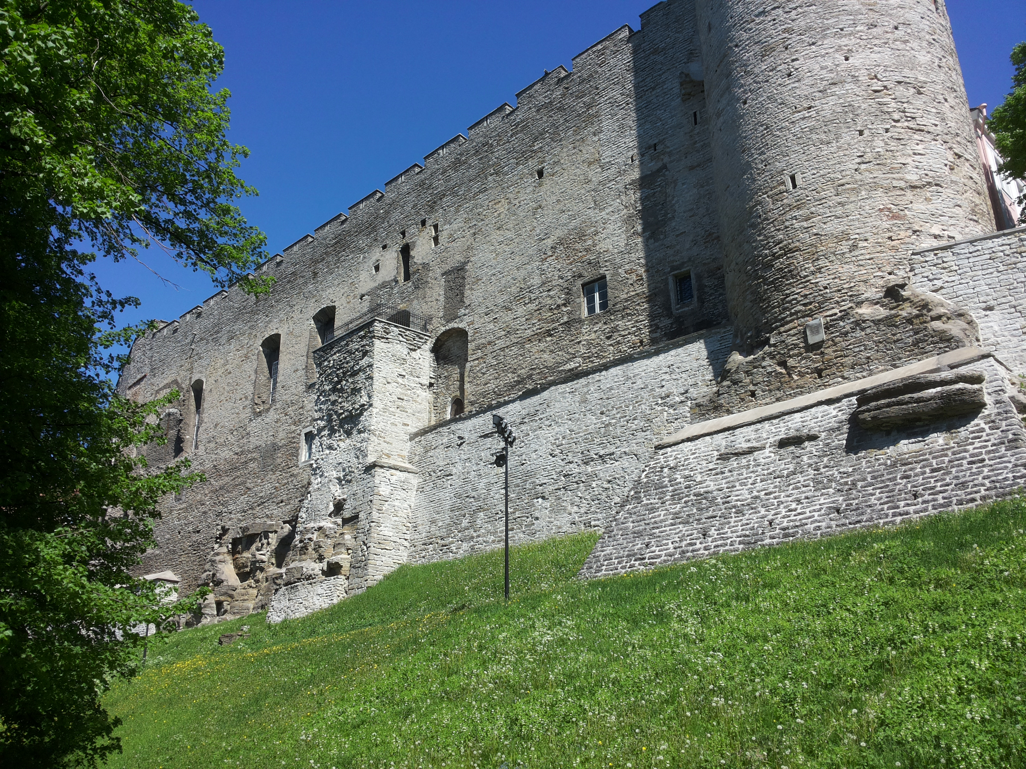 Toompea paljand